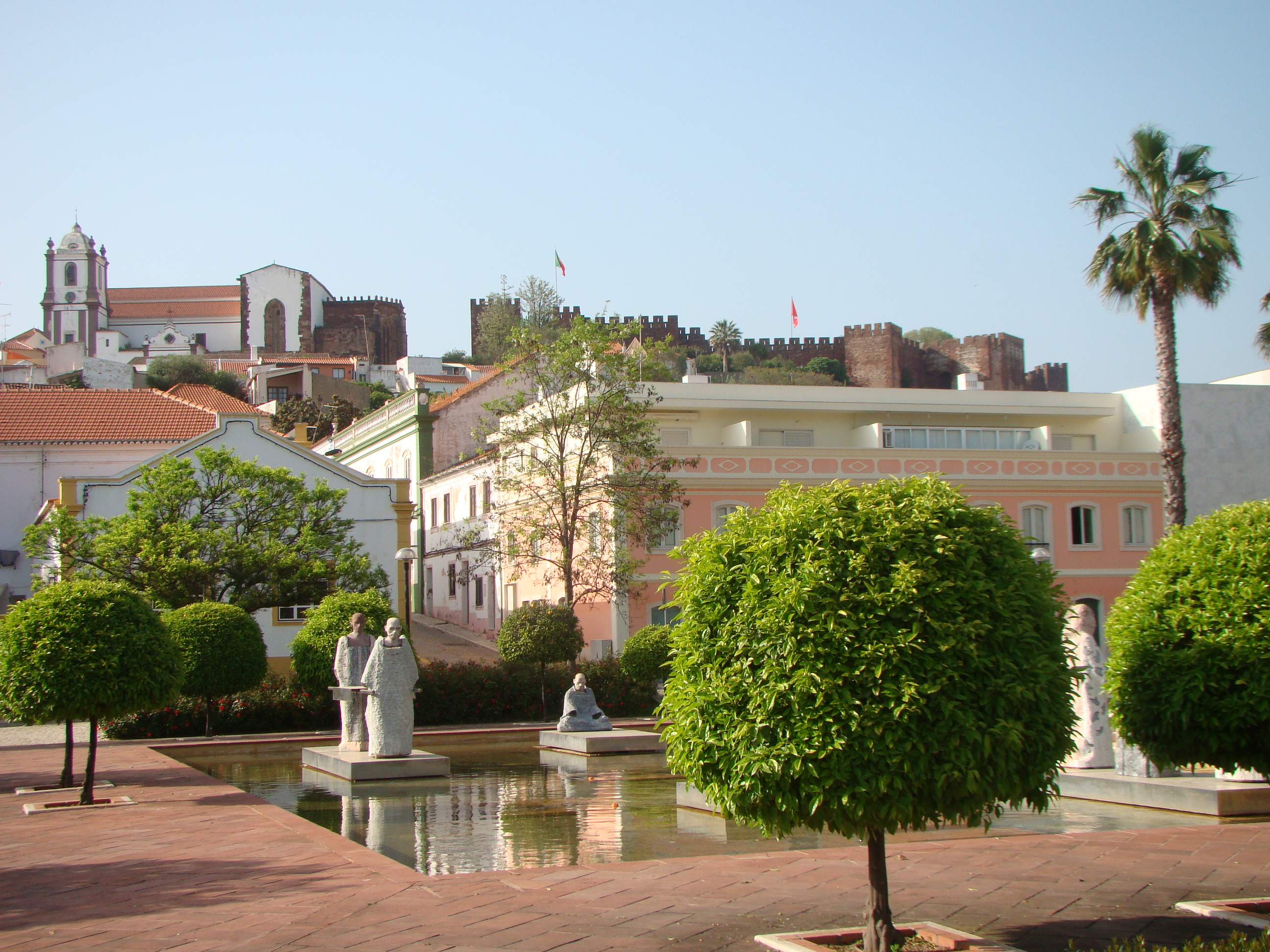 Vista do centro histórico de Silves, Algarve - 26-04-2018.